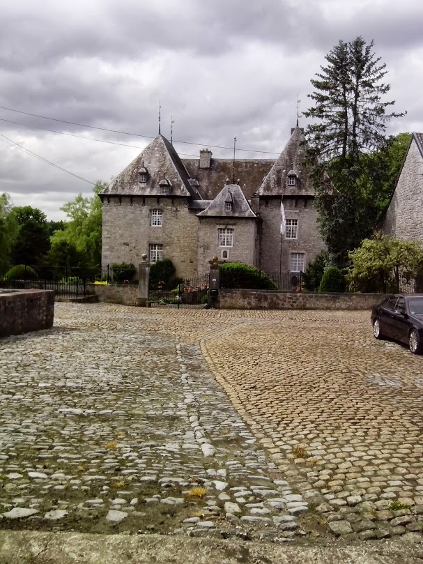 Haus Amstenrath in Eynatten, Aachenerstraße 27